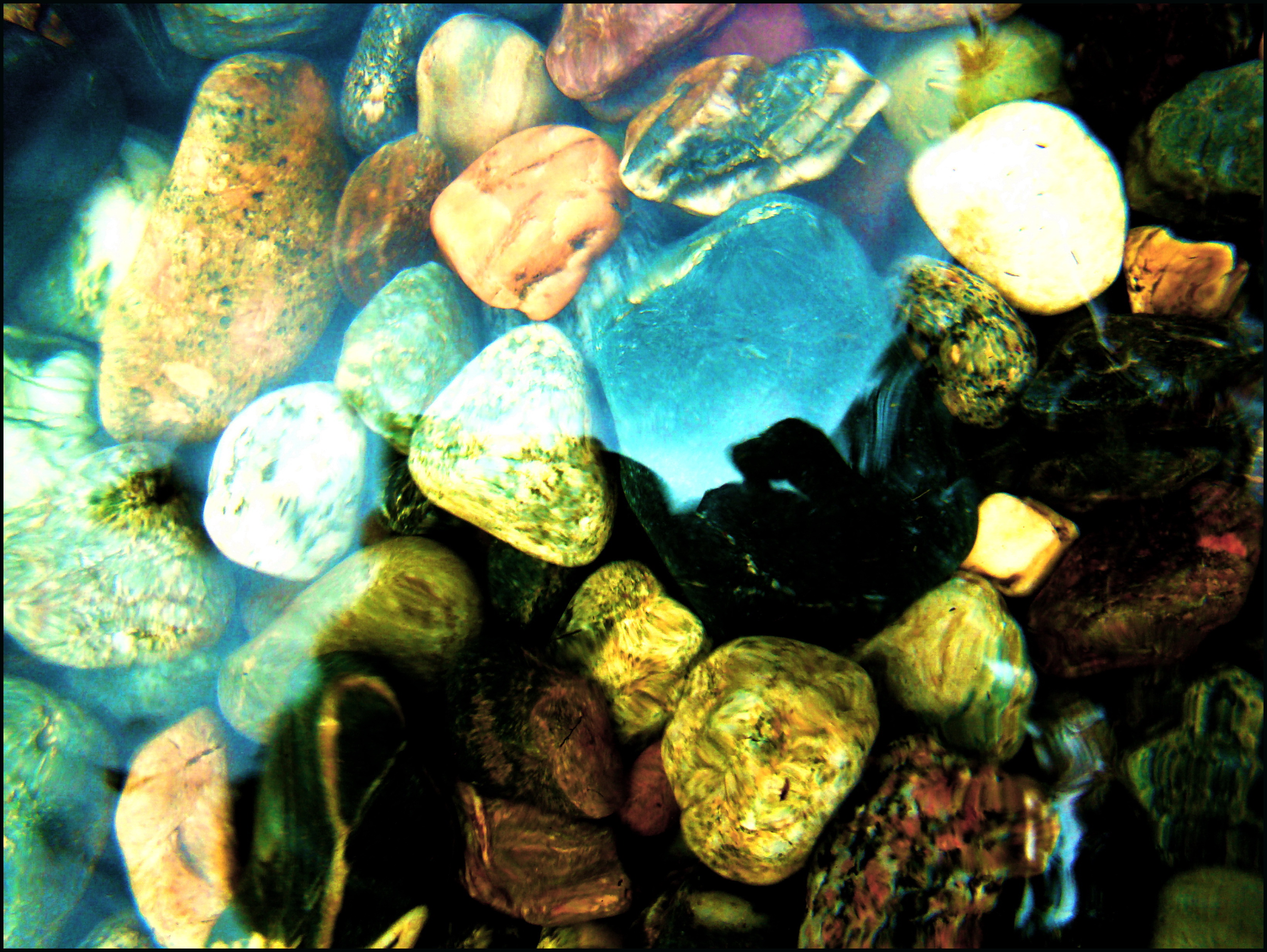 Средне и хорошо окатанная преимущественно угловатая галька уплощенной формы из береговой полосы Телецкого озера. Алтай. Июль 2010 года. Фото А. Н. Рудого.